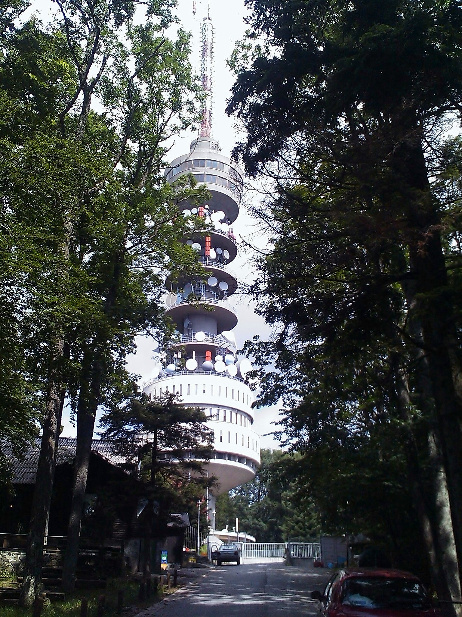 20.08.2010. _ Sljeme